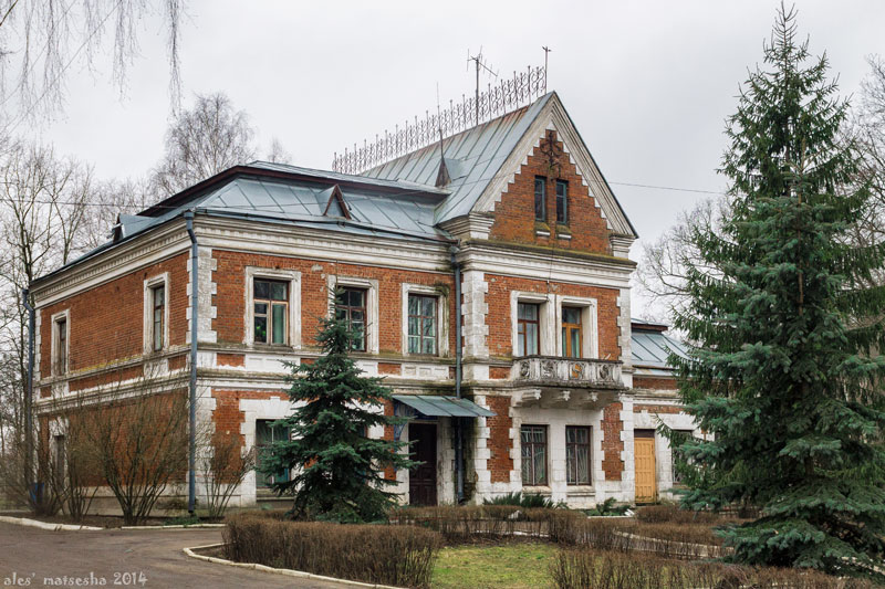 Палацава-паркавы комплекс Козелаў-Паклеўскіх, Красны Бераг